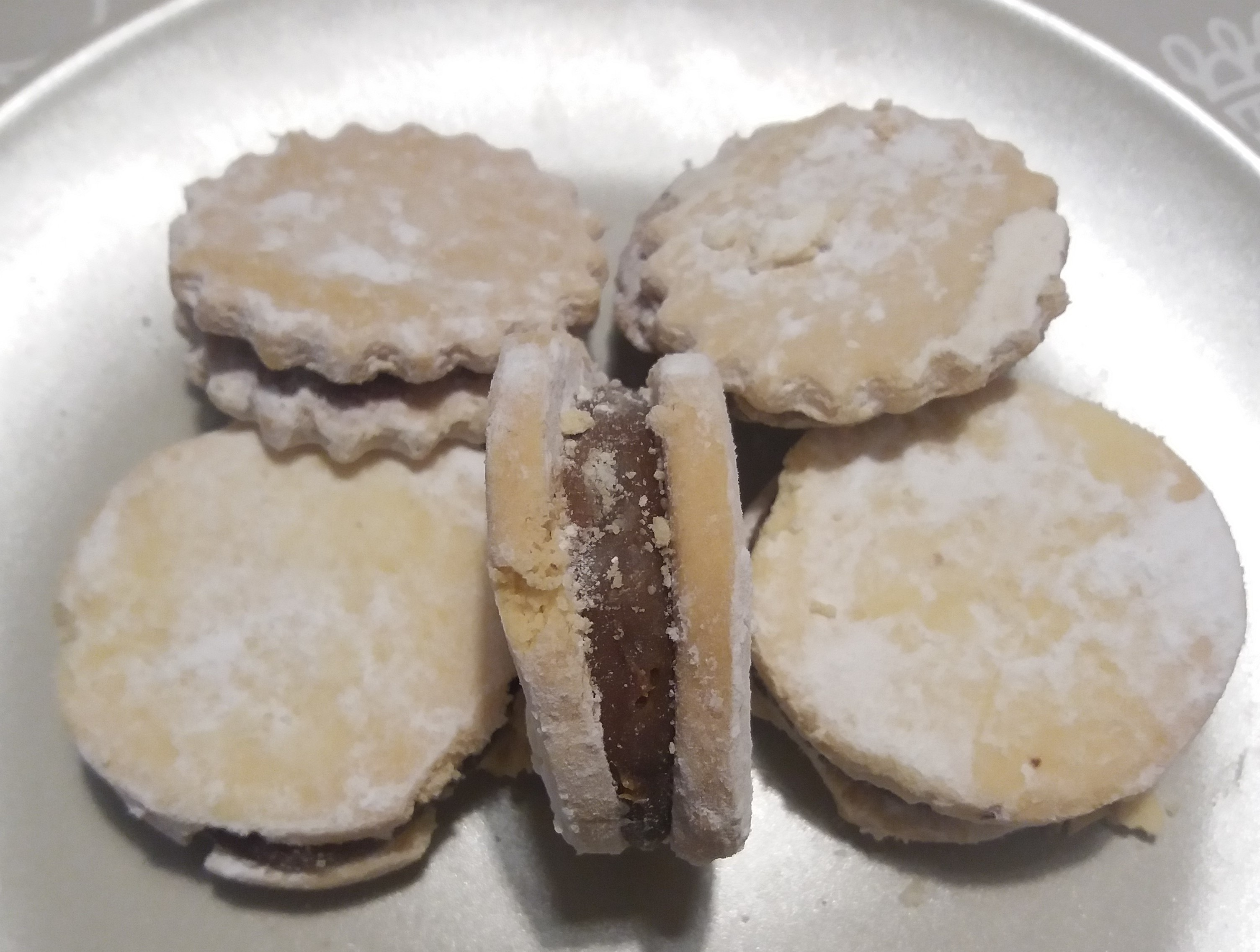 Variedad de alfajorcitos peruanos.